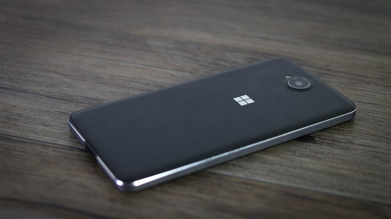 Foto de la parte trasera del teléfono Microsoft Lumia 650